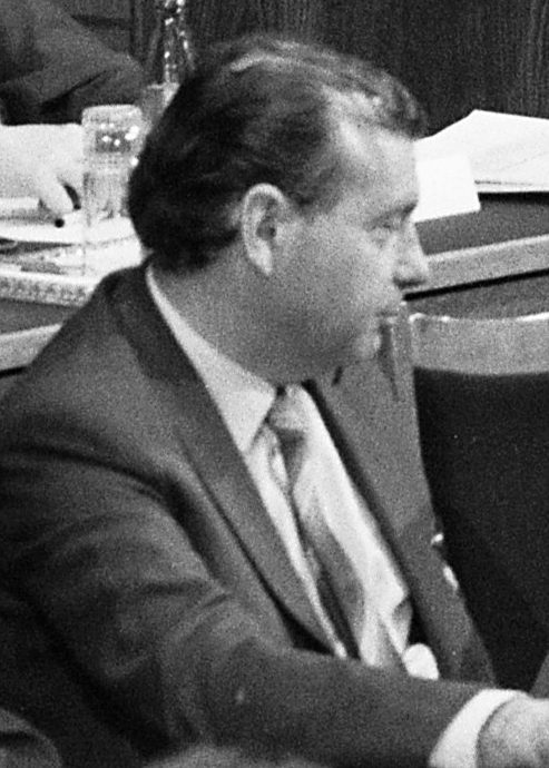 Horváth István jogász, bíró, politikus, a KISZ Központi Bizottságának (KB) első titkára, az MSZMP Központi Bizottságának (KB) titkára, az Elnöki Tanács tagja, miniszterelnök-helyettes, belügyminiszter.